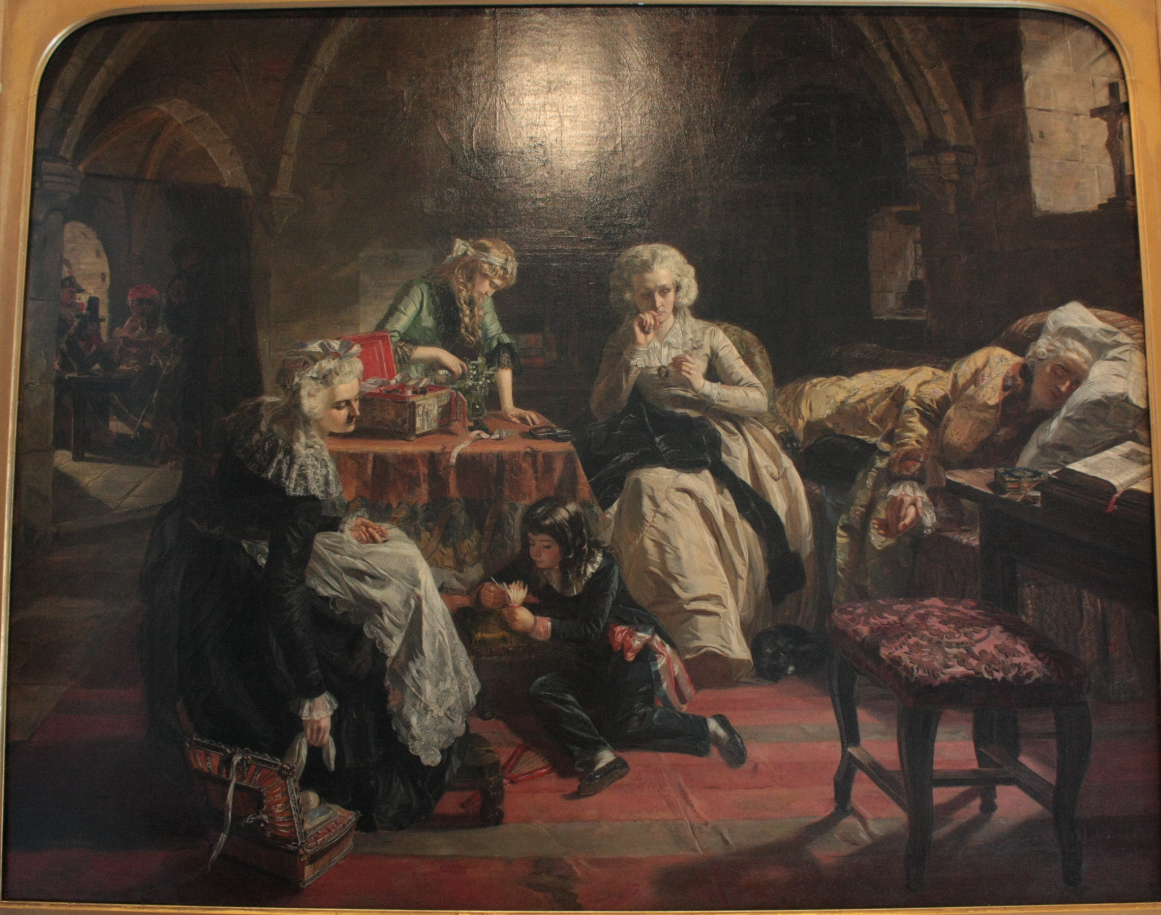 La Famille royale dans la prison du Temple, par Edward Ward, 1851